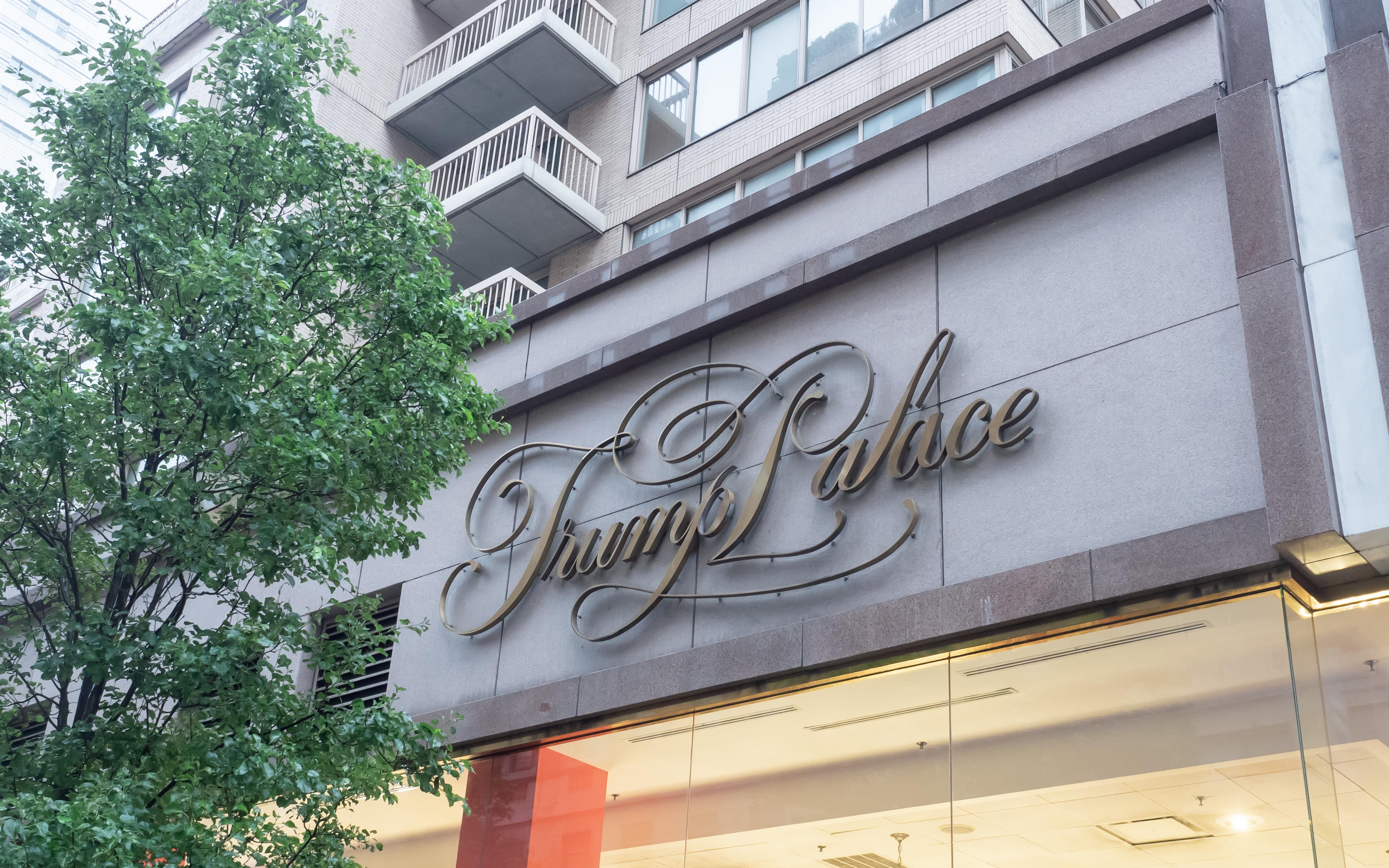 Upper East Side, NYC